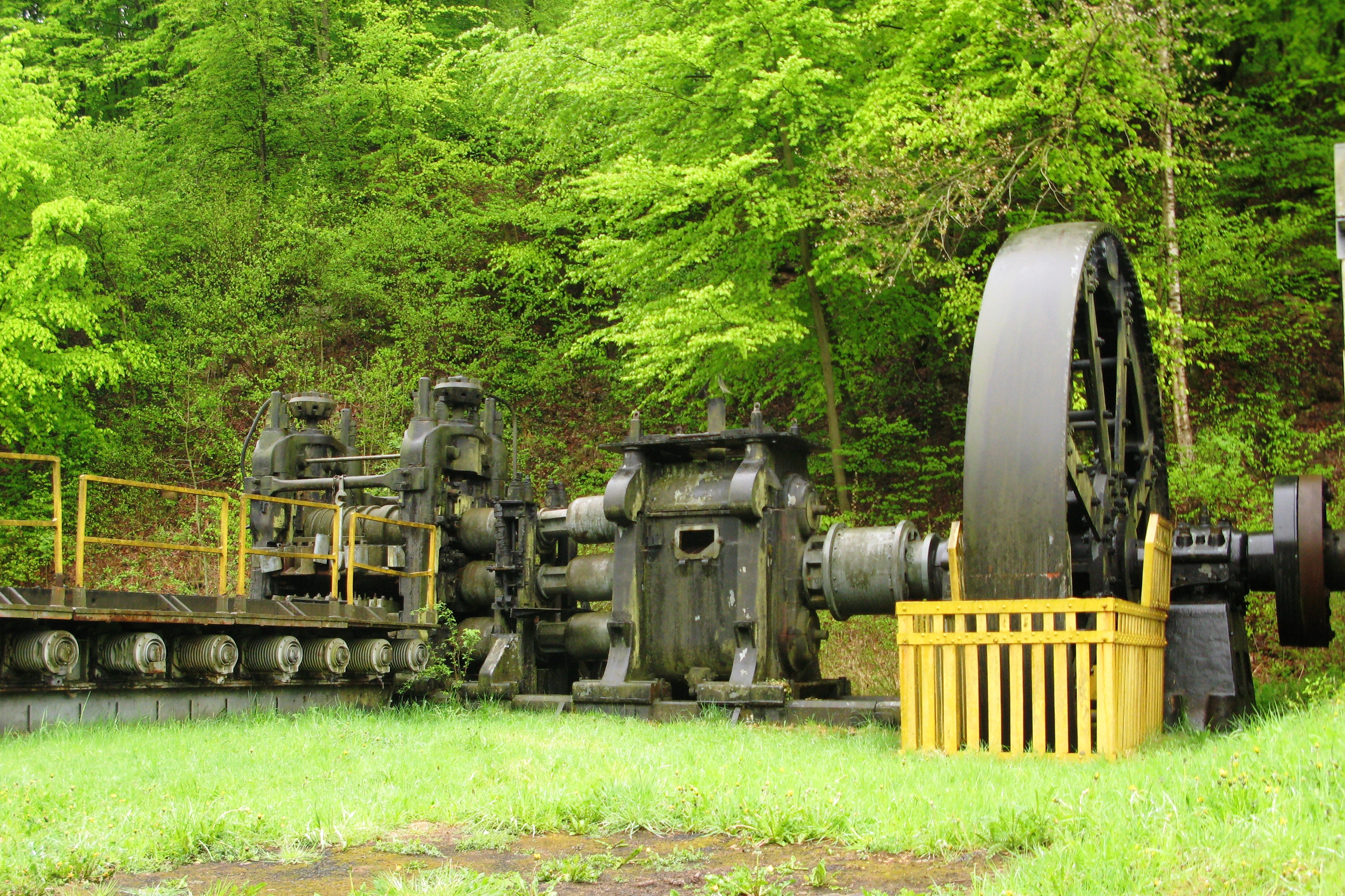 Aalt Walzwierk ausgestallt am Industriepark am Fonds-de-Gras Auteur: Les Meloures Kategorie:Industriell Installatiounen